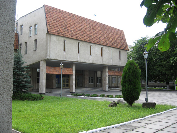 Академия управления в БрюховичахПГТ в составе Львова